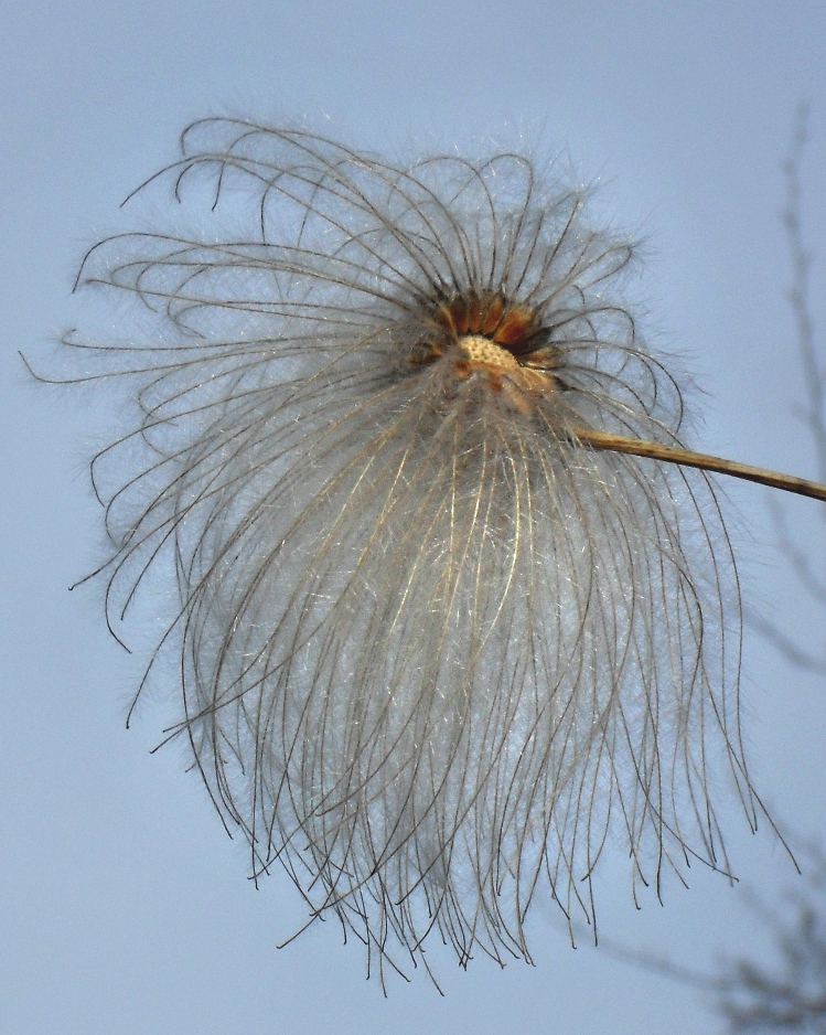 Clematis tangutica - Botanischer Garten Leipzig